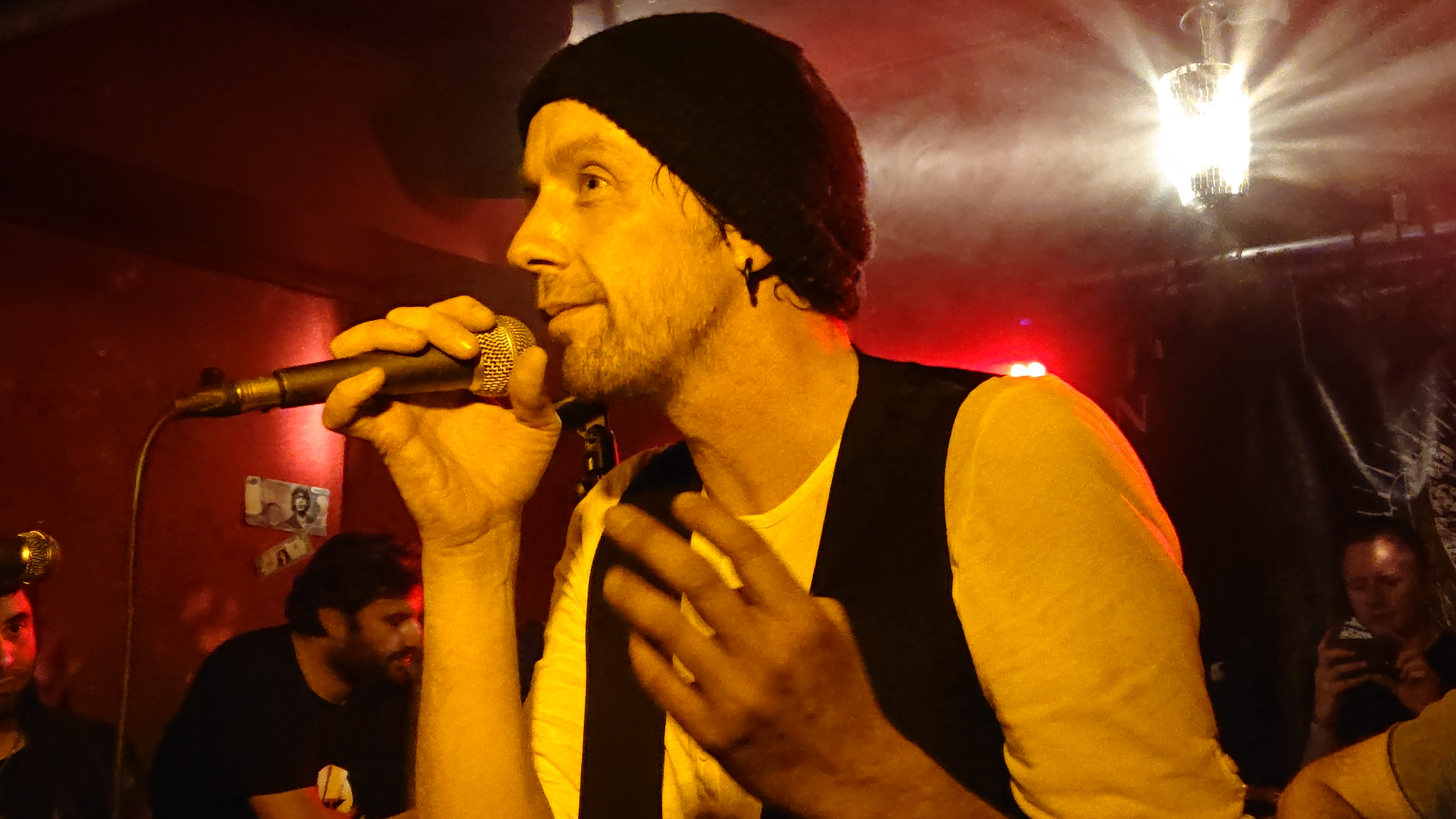 Der Ole Live